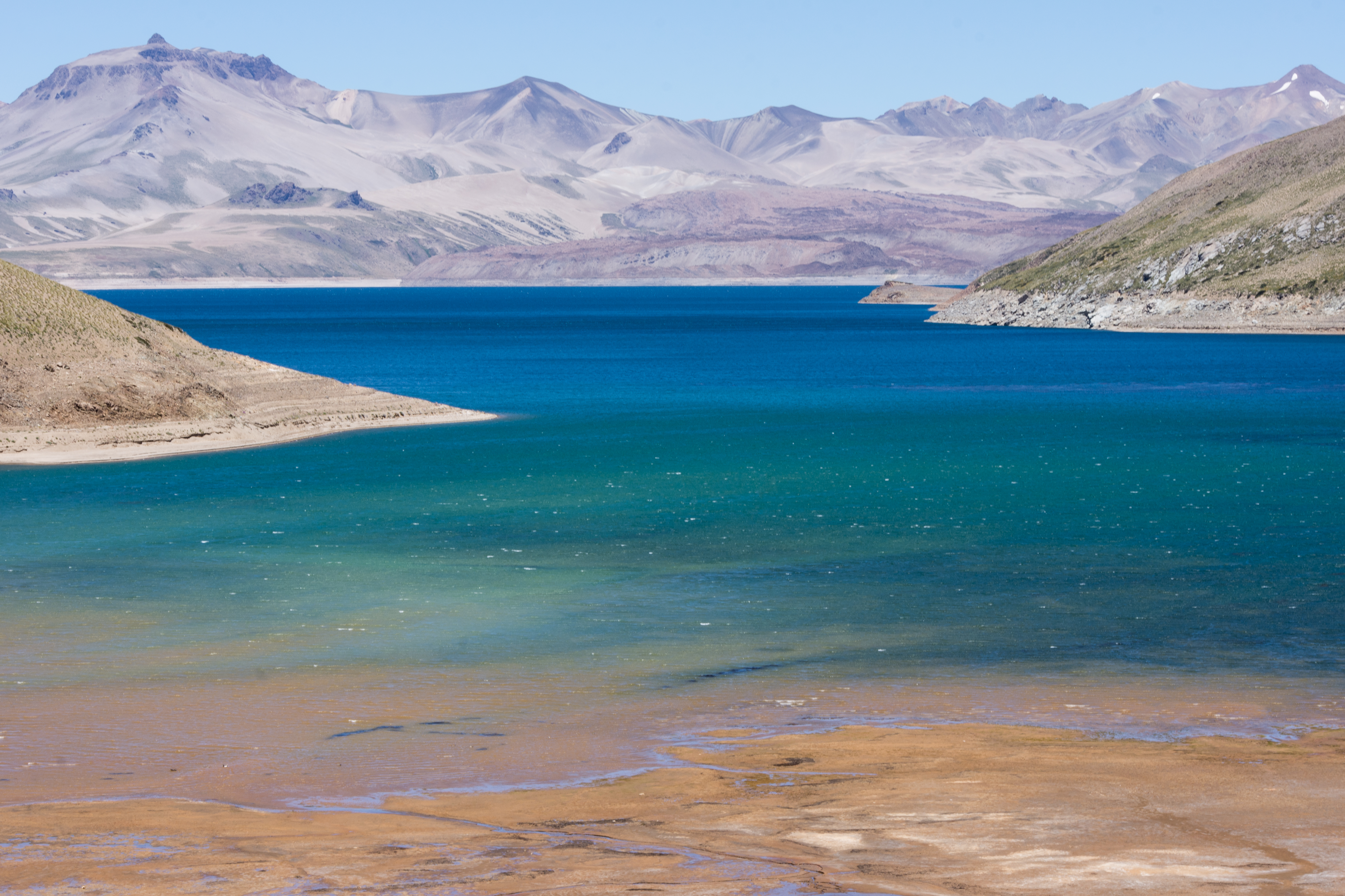 Laguna del Maule, VII Región - Chile.